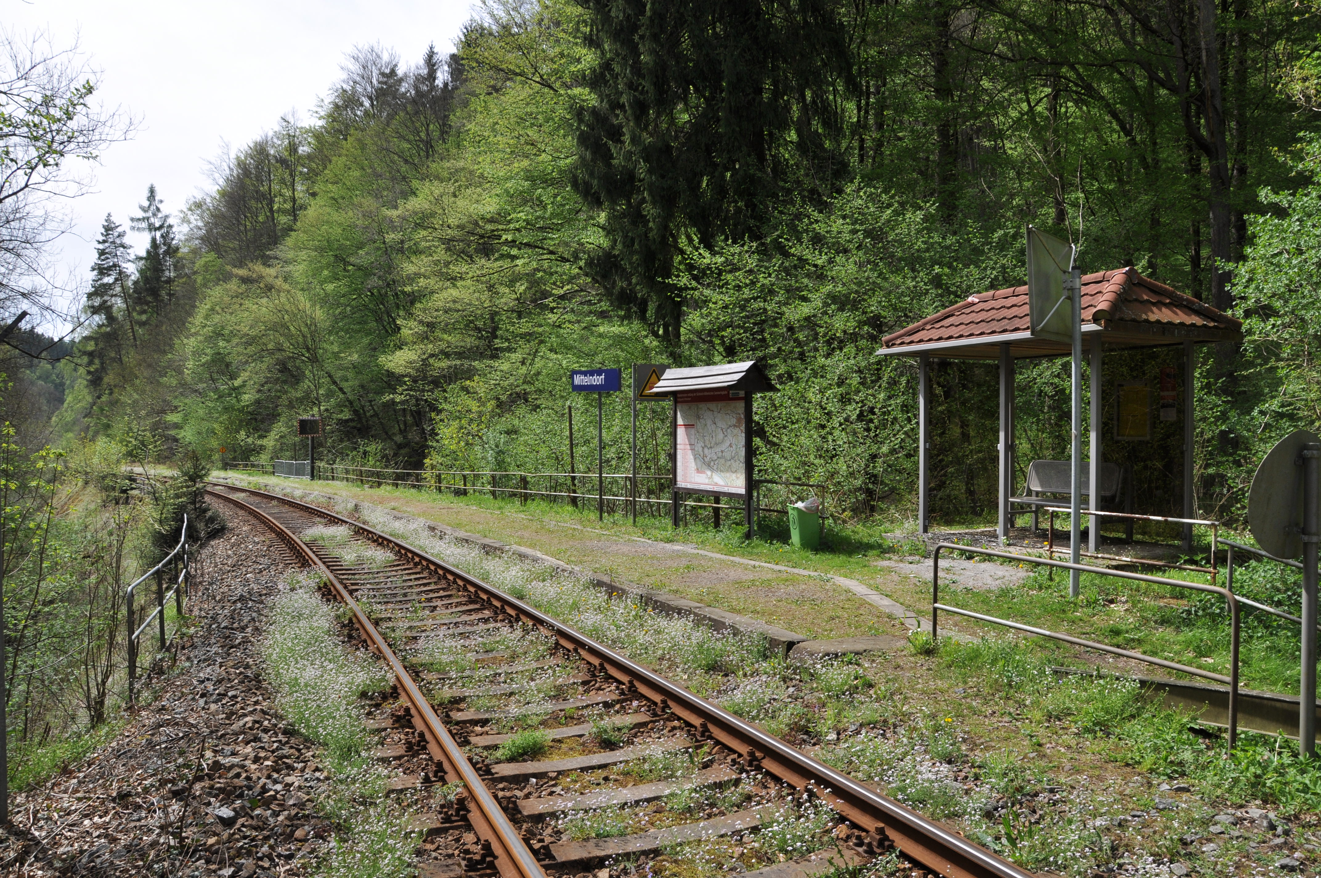 Haltepunkt Mittelndorf, Sebnitztalbahn